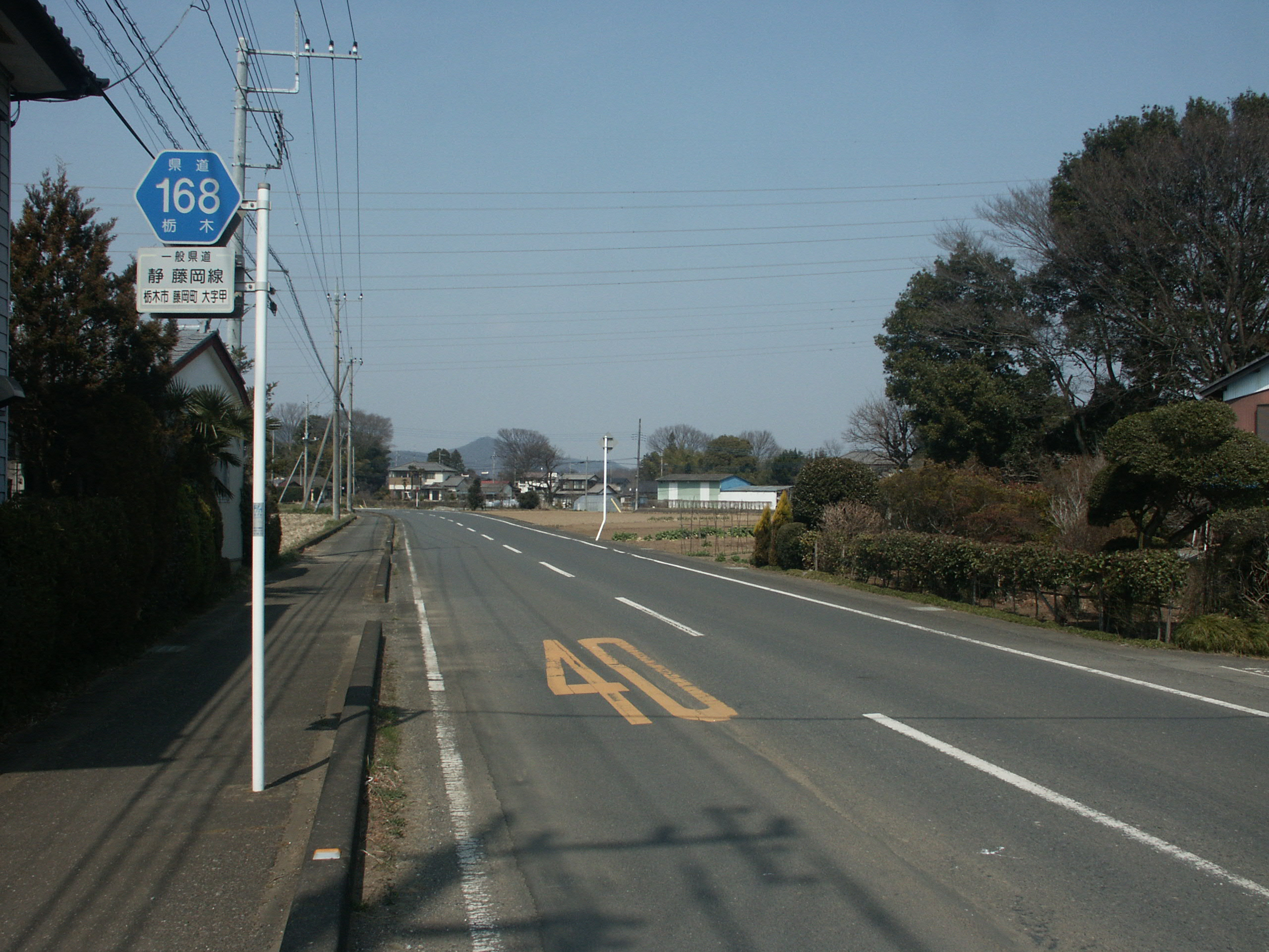 栃木県道168号線栃木市藤岡町甲付近